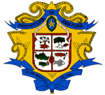 Brasão de Armas do município amazonense de Amaturá, Brasil.